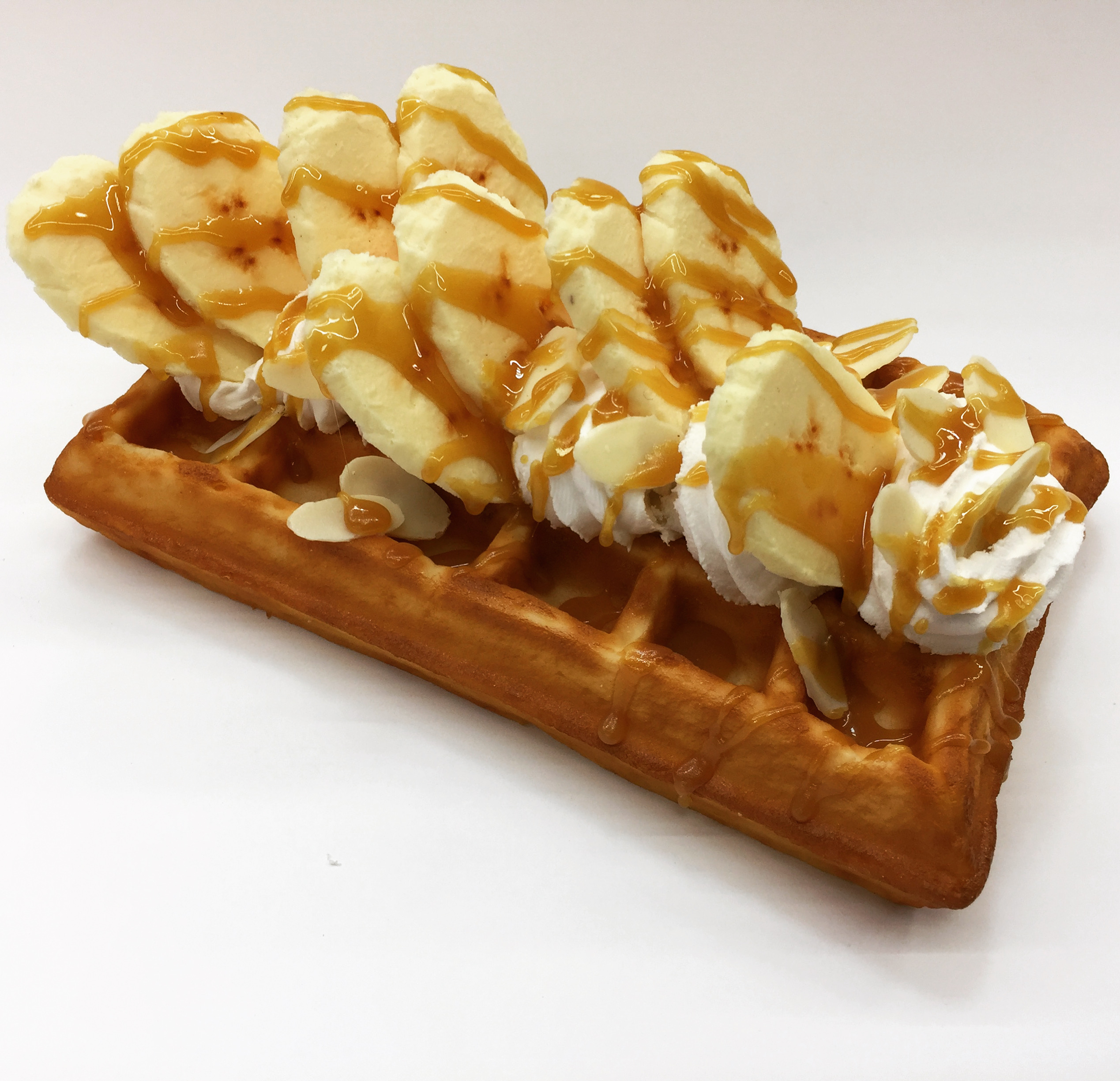 Муляж бельгийской вафли, изготовлен компанией NLModels, Москва.